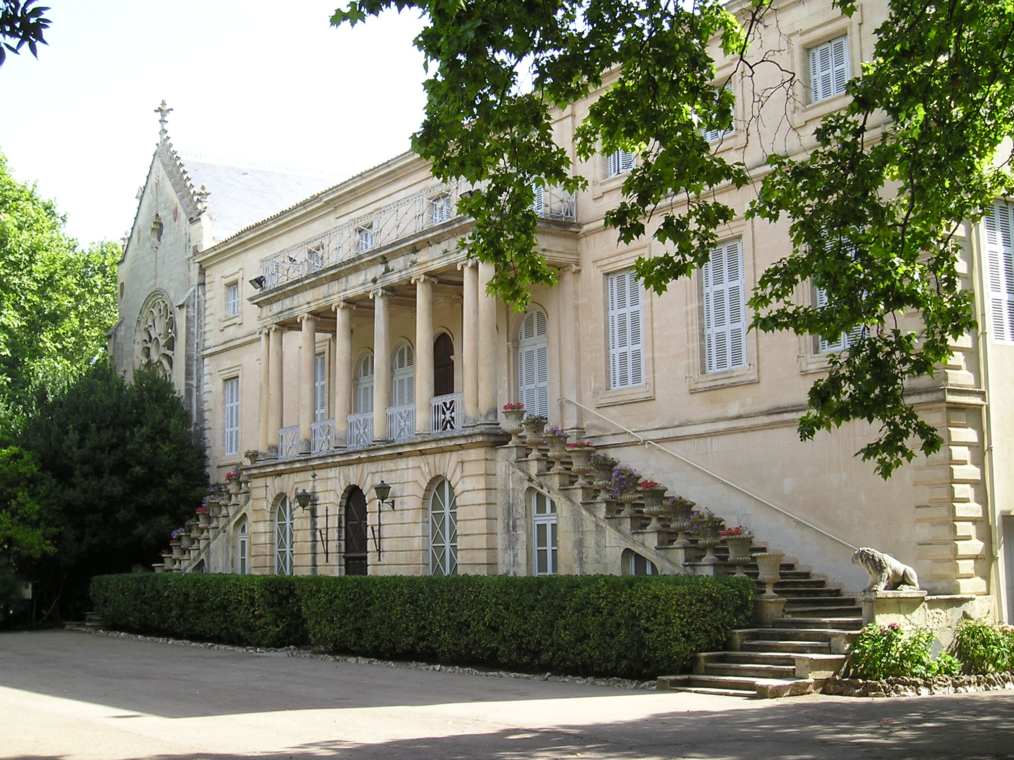 A Montpellier, la façade du bâtiment principal du domaine de Grammont. Sur la gauche, la façade de la chapelle.